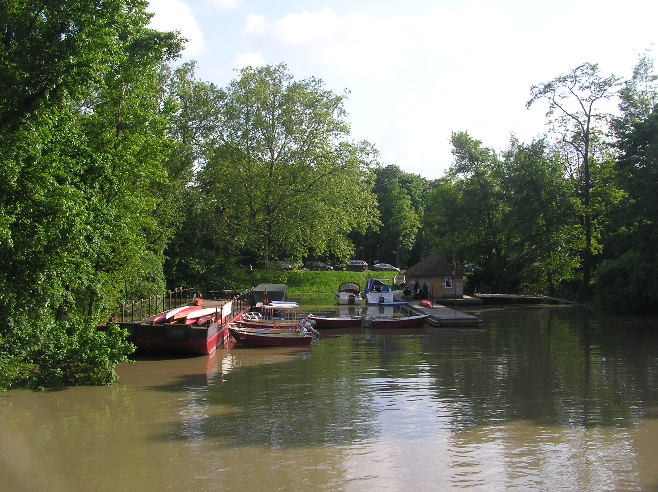 Zatoka Gondoli